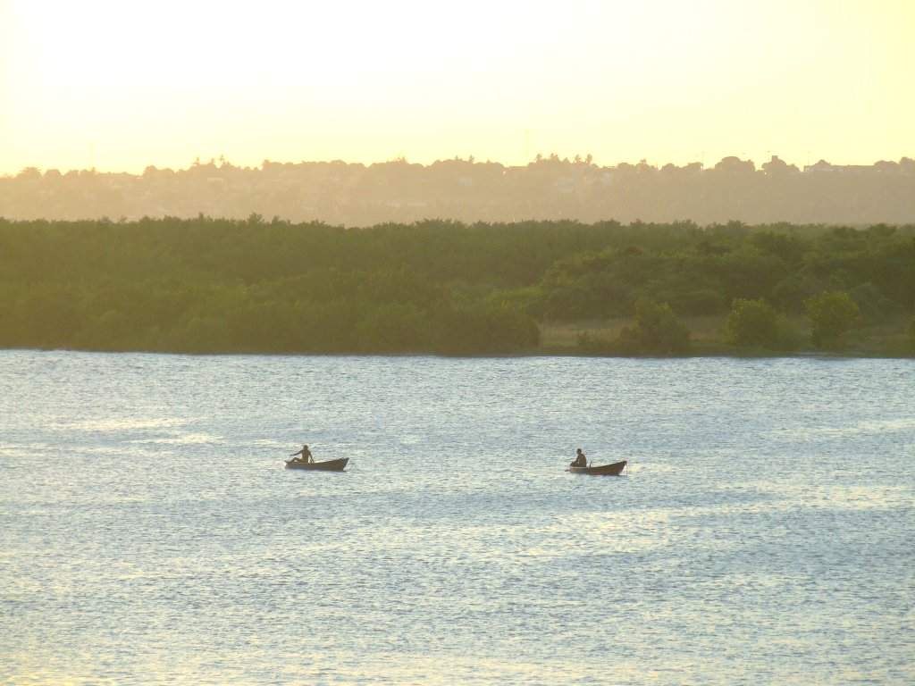 Rio Potengi em Natal, Rio Grande do Norte, Brasil